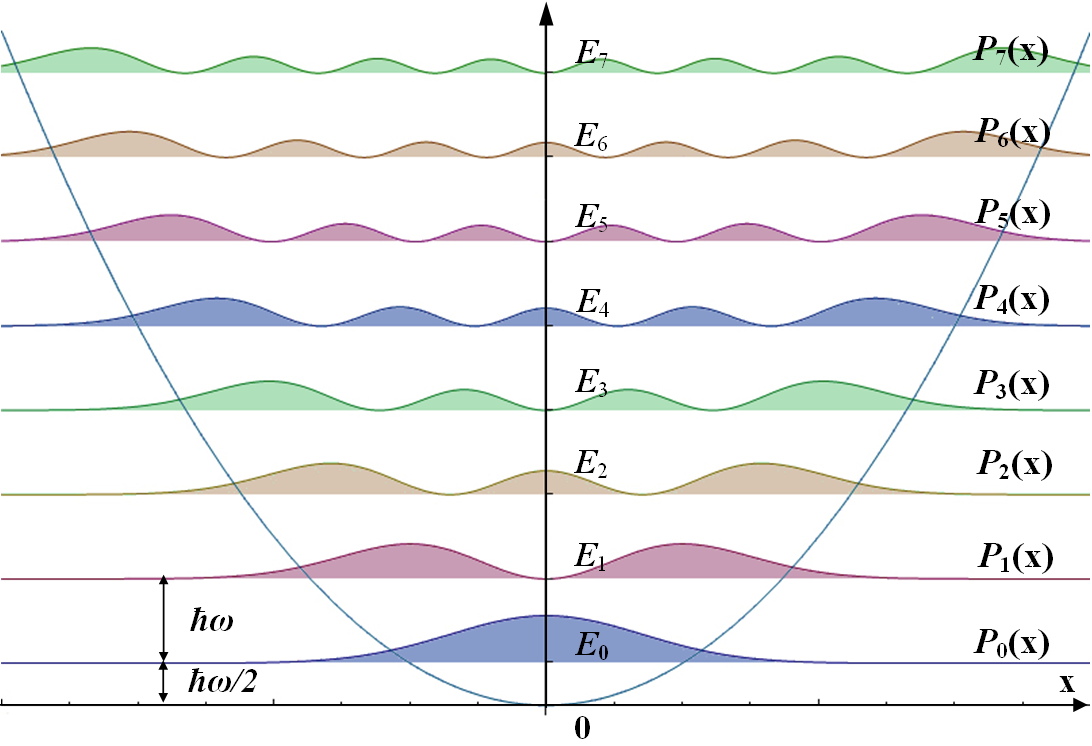 Quantenmechanischer Harmonischer Oszillator einer Dimension